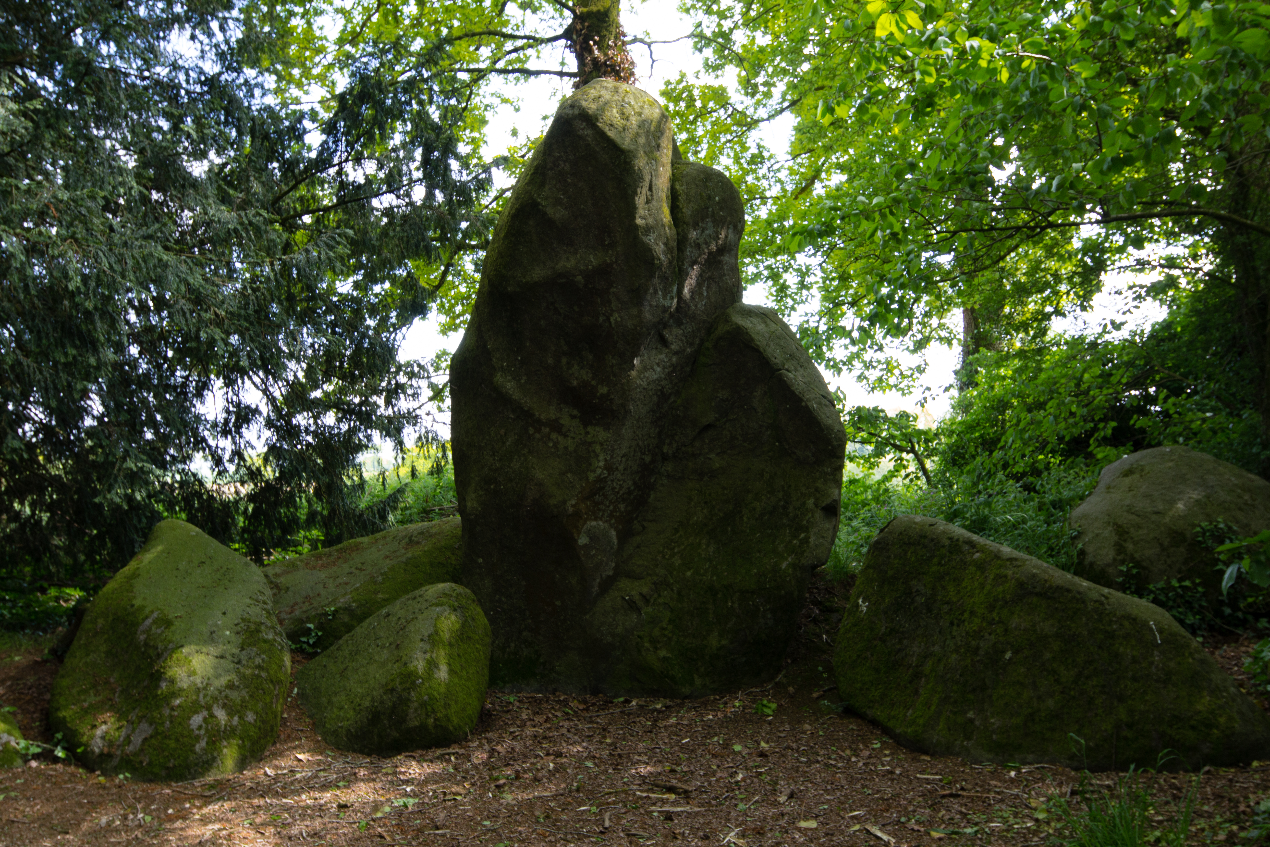 Les roches du diable : menhir dressé à Miniac-sous-Bécherel (France).